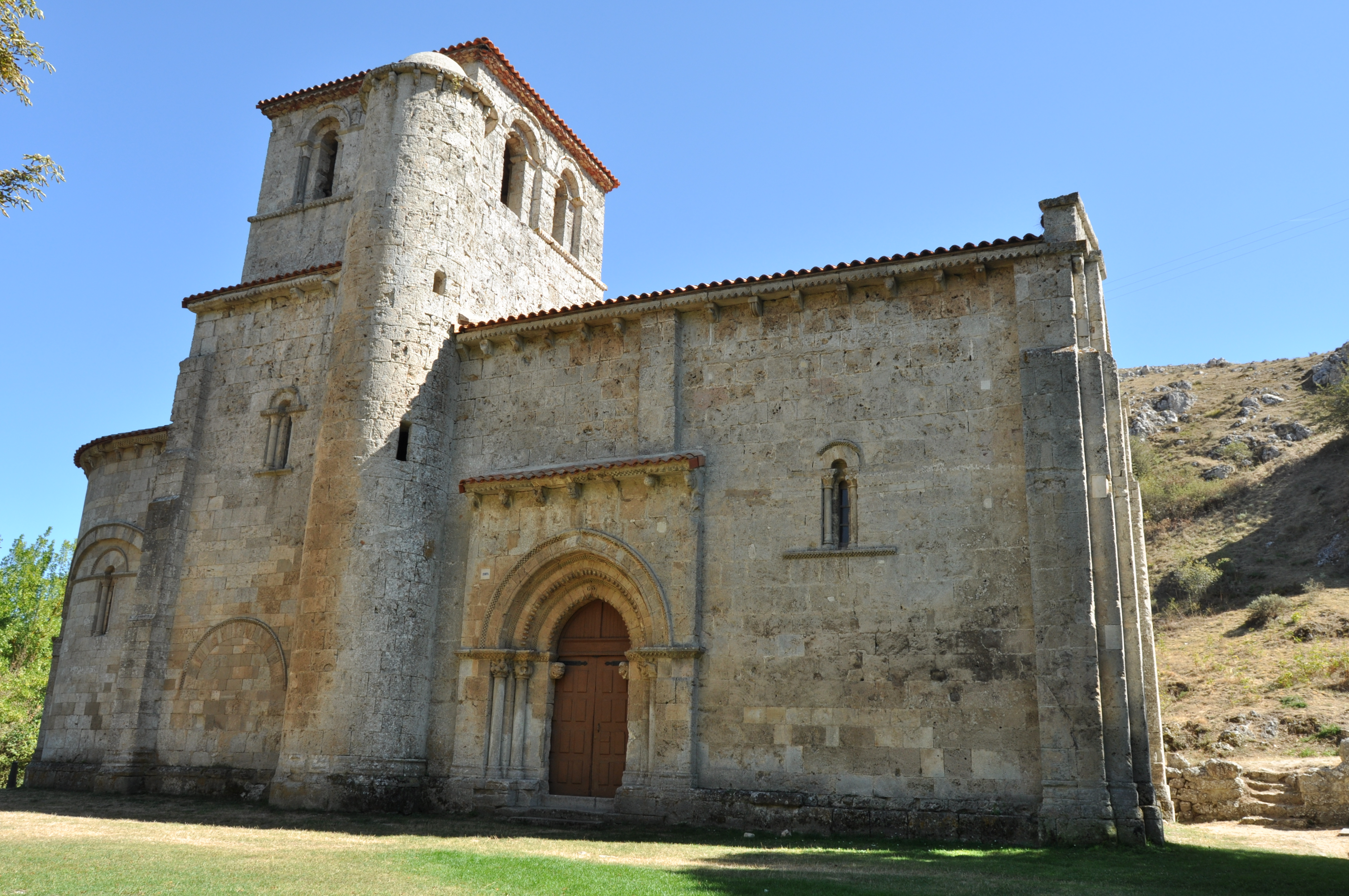 Monasterio de Rodilla - 001